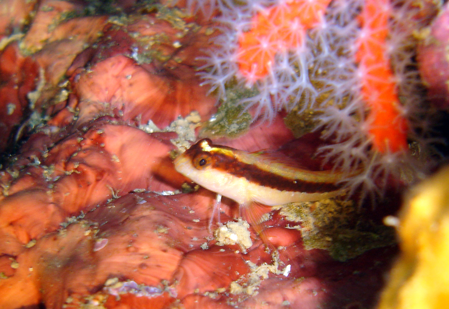 Blennie de roux (Parablennius rouxi), baveuse à flanc noir